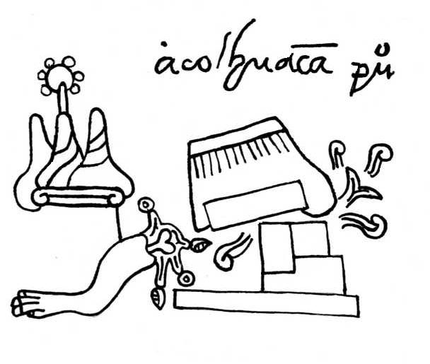 Imagen reprografiada del códice Mendocino, lámina 5v. Representa la derrota de Tetzcoco (dibujado como tres peñas y una planta) que es parte del Acolhuacan, (dibujado como un brazo desmembrado del cual por la parte superior sale agua.) La conquista se suele representar por un templo del cual salen llamas y humo.